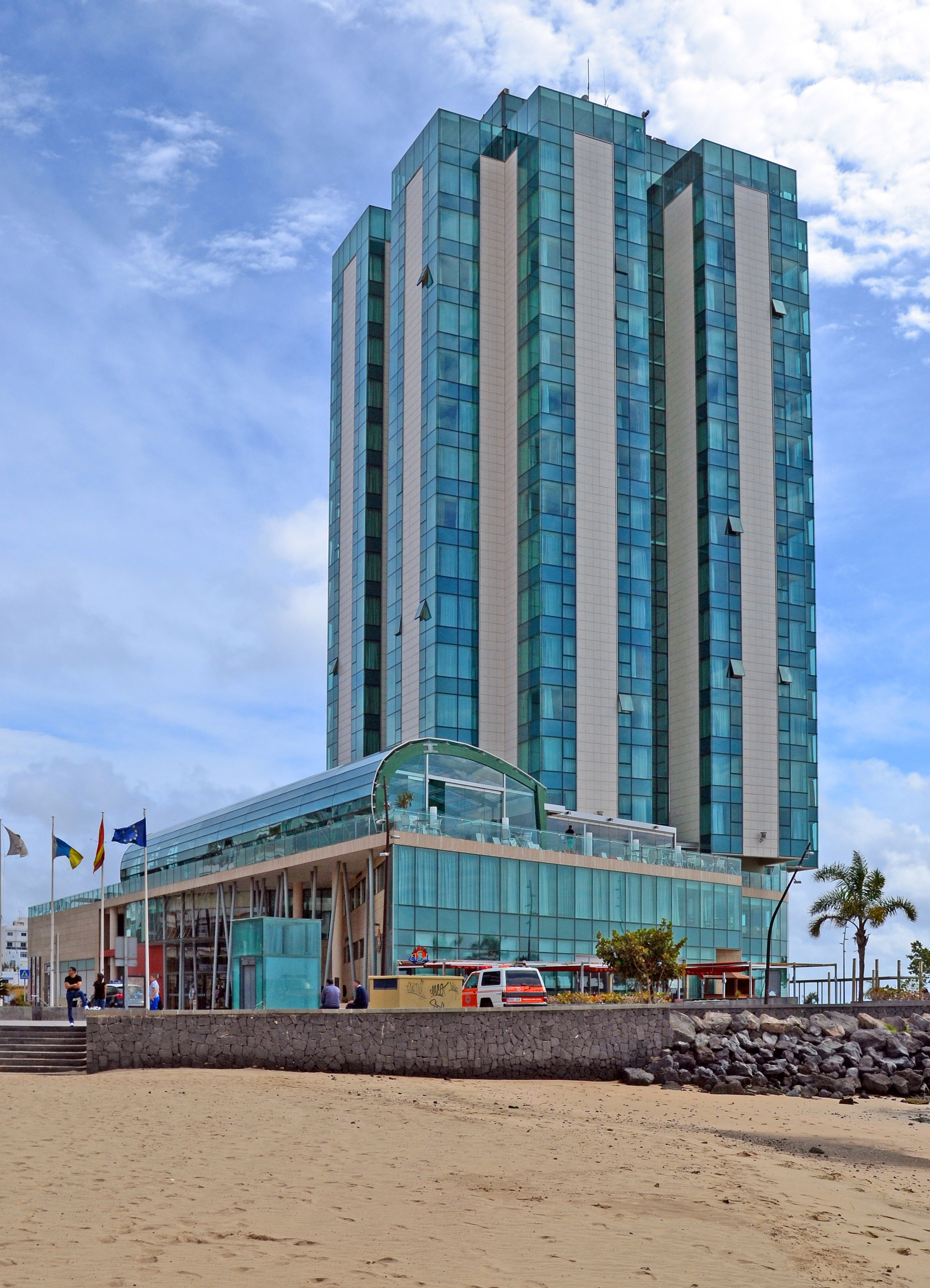 Gran Hotel in Arrecife, der Hauptstadt von Lanzarote, Kanarische Inseln, Spanien